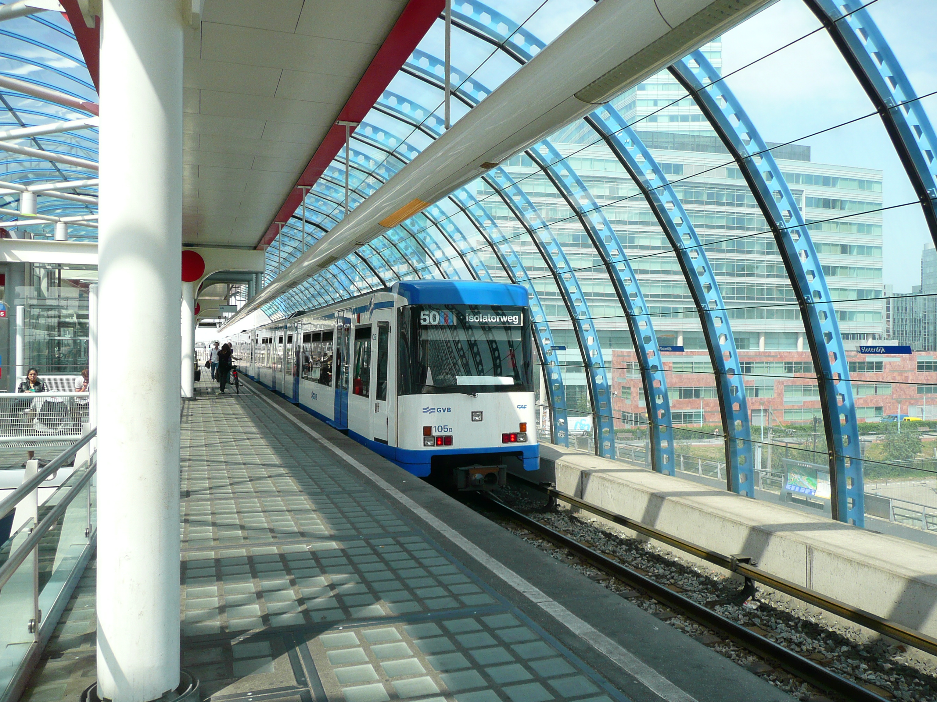 Station Amsterdam Sloterdijk, Amsterdamse metro, treinstel CAF M4